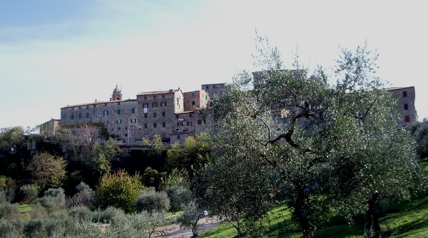 Panorama di Pari (GR)